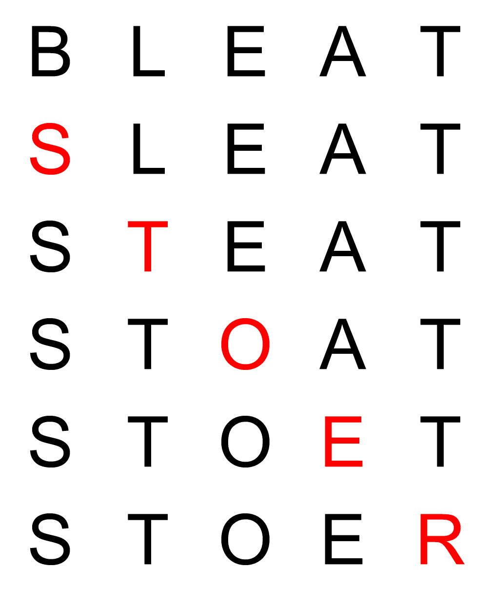 Wurdljedder